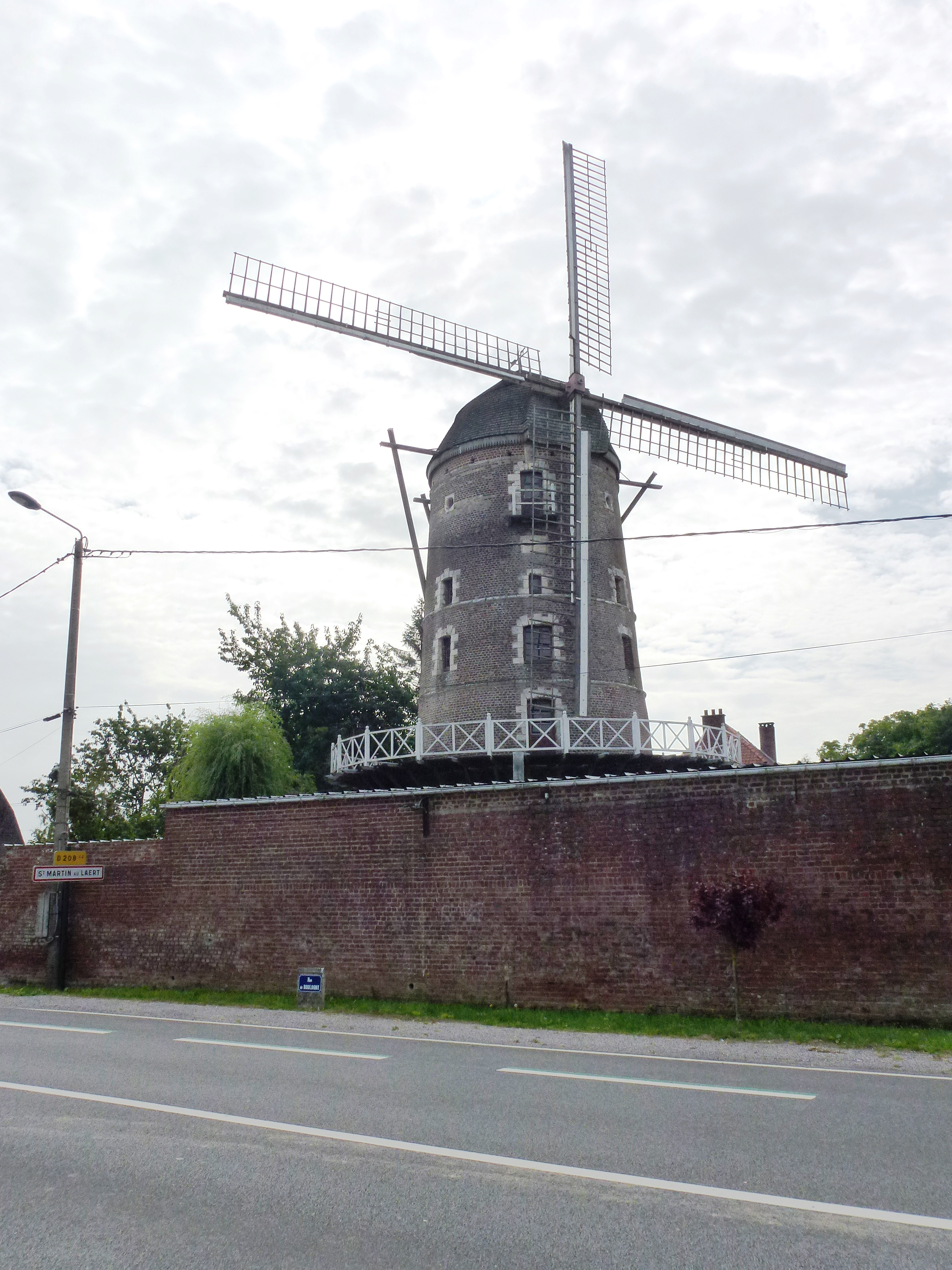 Saint-Martin-au-Laërt (Pas-de-Calais, Fr) moulin PA62000046 .